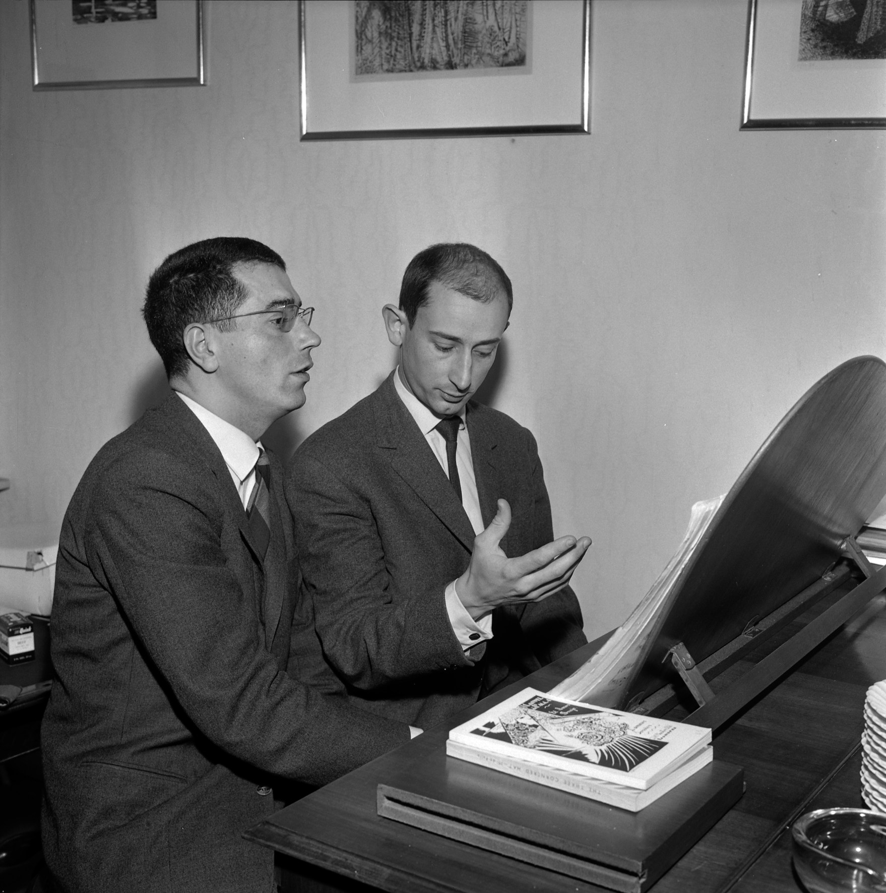 Concervatoire de Toulouse. Le 10 Décembre 1965. Vue du compositeur toulousain Xavier Darasse donnant un cours de piano à une personne.